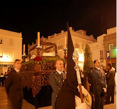 Santo Entierro de Chiclana